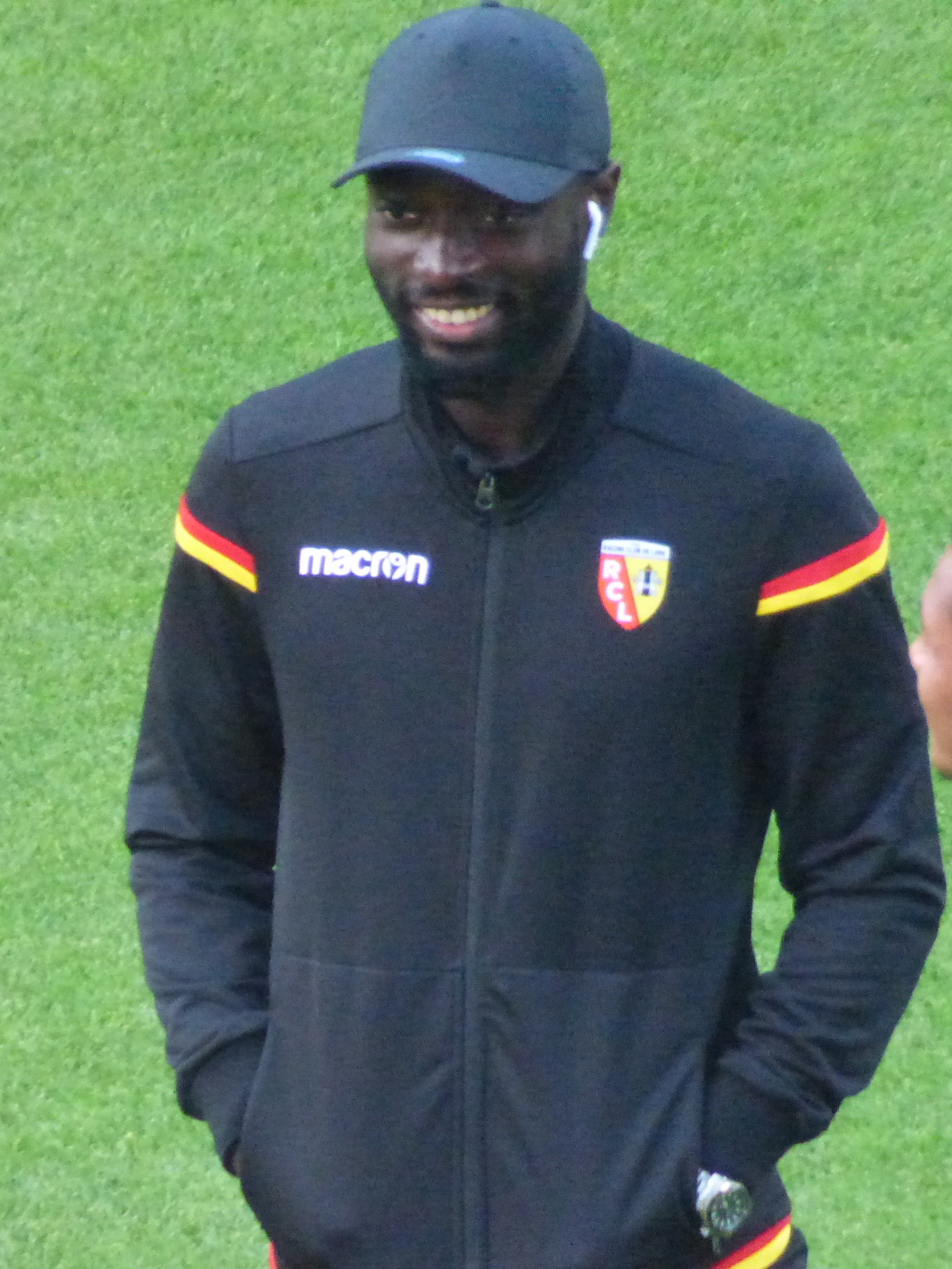 Grejohn Kyei avant le match Lens / Paris, comptant pour la neuvième journée du championnat de France de football de Ligue 2, le 28 septembre 2018.